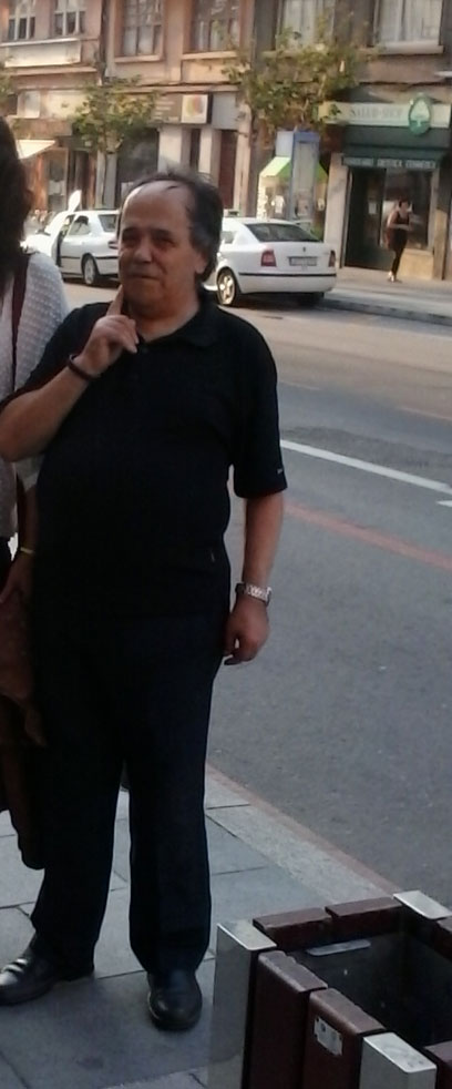 Cañita Brava na Gaiteira Os Castros A Coruña Galiza Spain